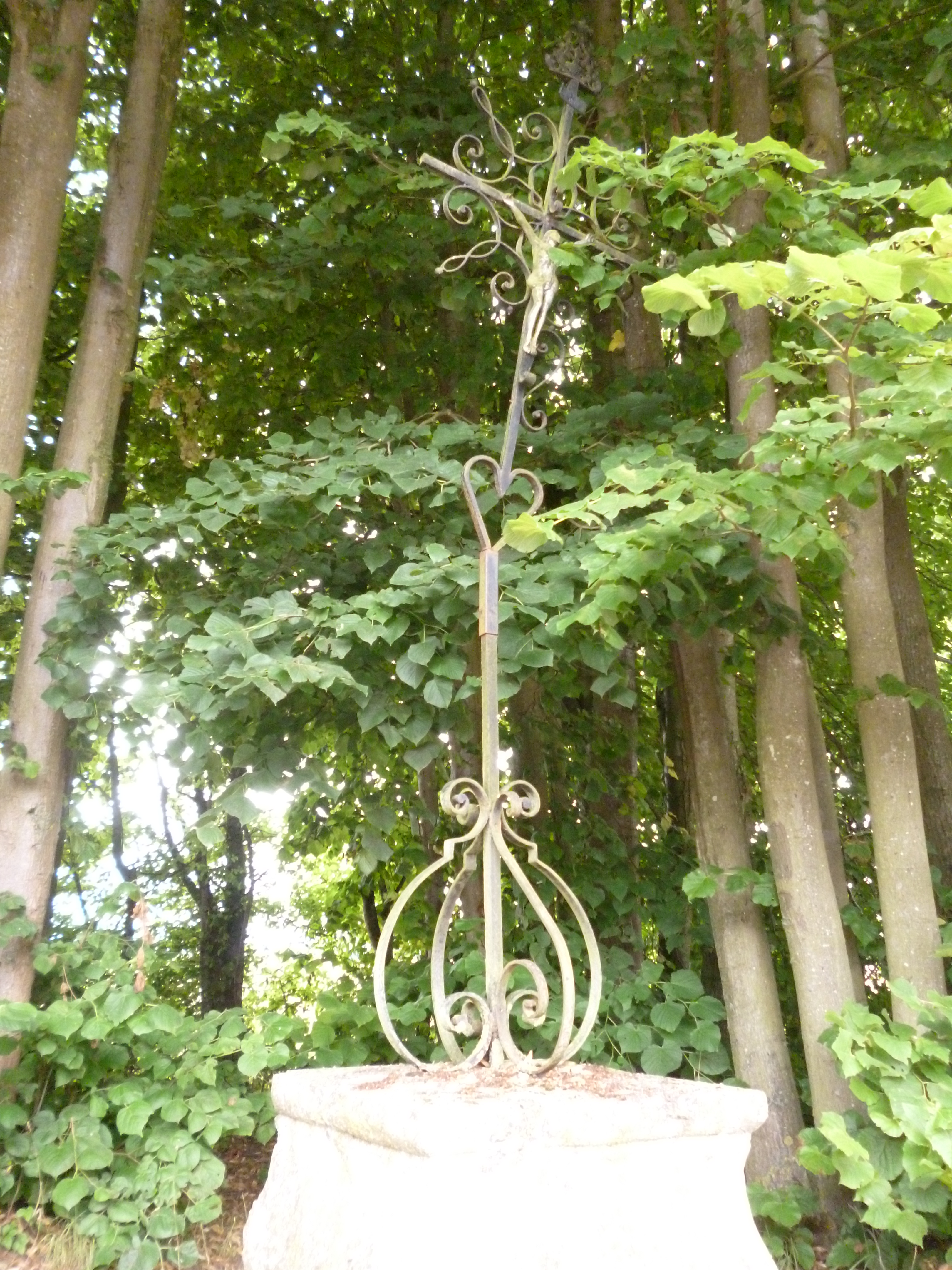 Calvaire situé sur la commune de Beauvoir (Oise), dans le hameau d'Evauchaux.